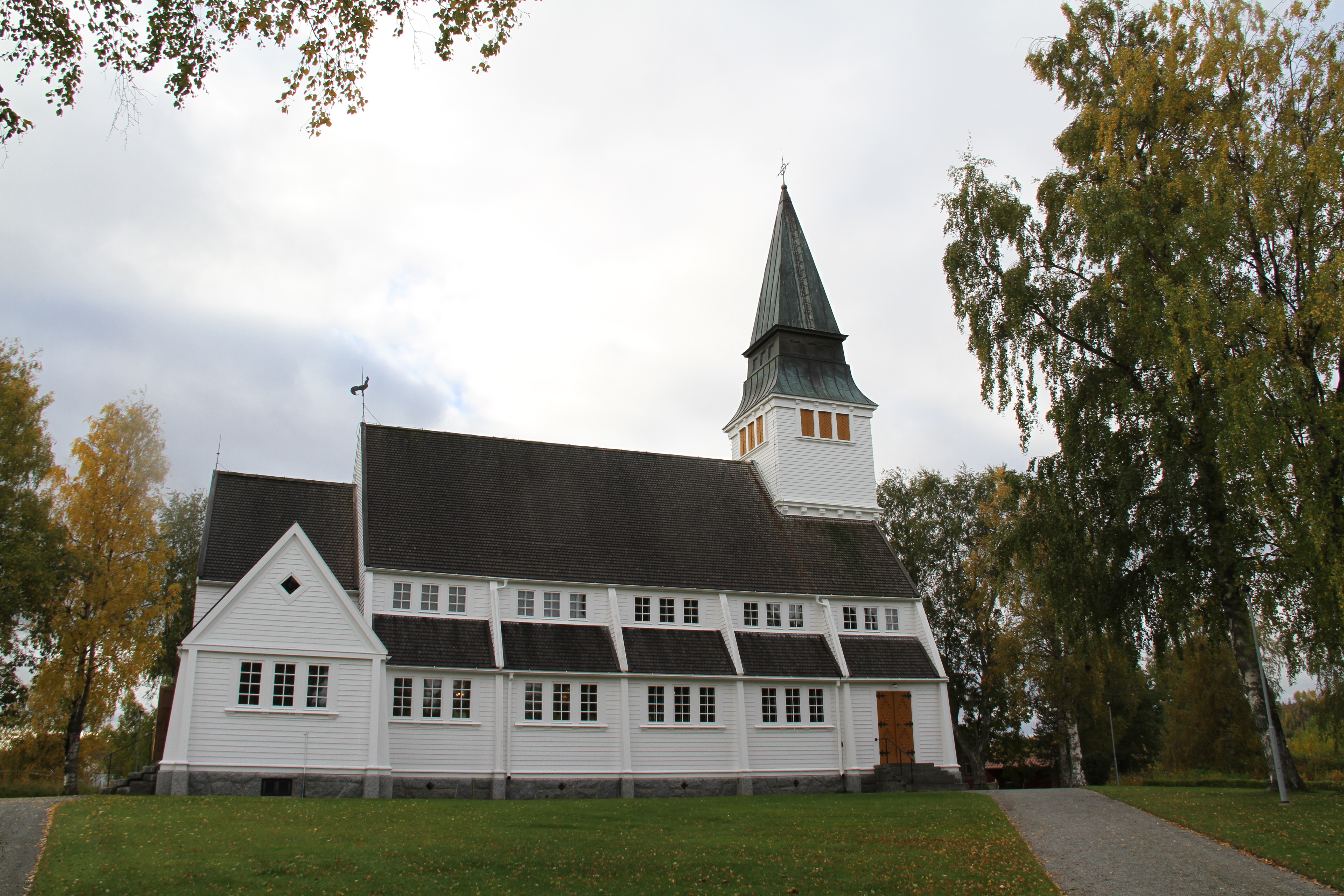 Alanäs kyrka, Ström-Alanäs församling, Strömsunds kommun, Jämtlands län.